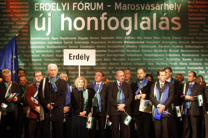 Erdélyi Fórum - Marosvásárhely 2008